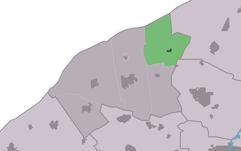 Kaartsje fan himrik fan Aldebiltsyl